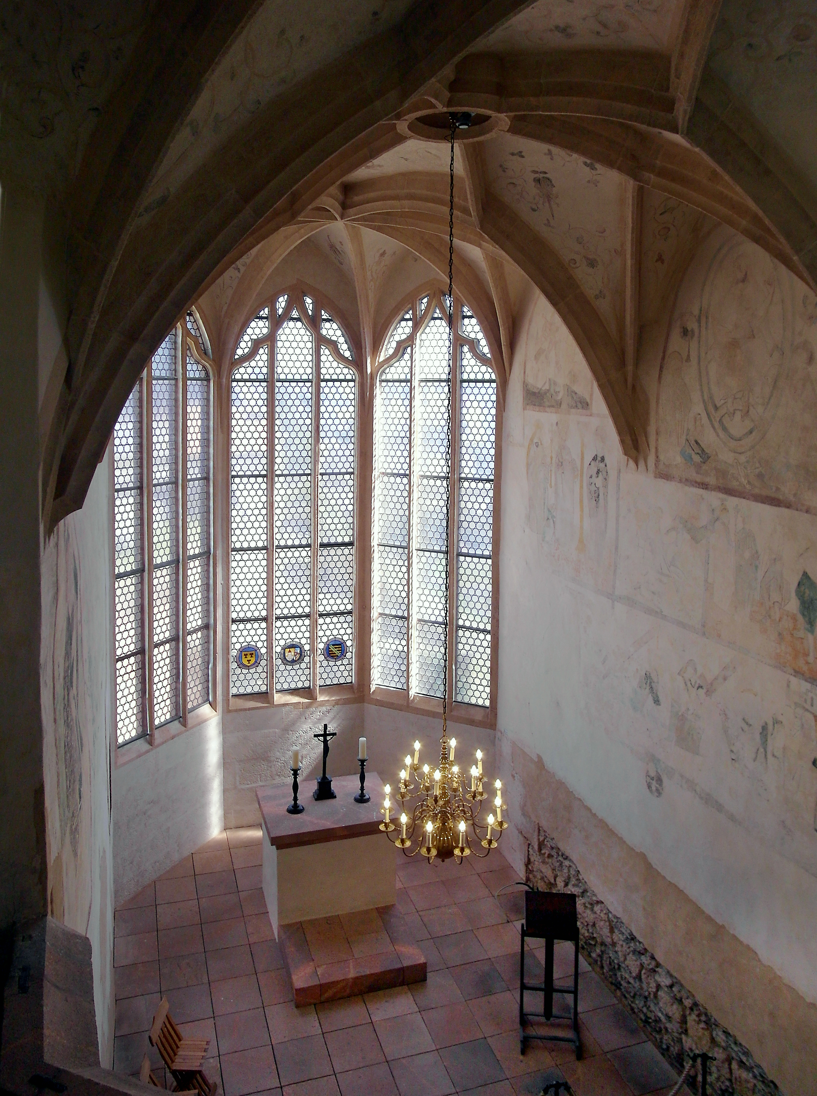 10.04.2018 09306 Rochlitz: Schloß (GMP: 51.045068,12.791399). Blick von der Empore zum Chor der spätgotischen Schloßkapelle. [SAM5160.JPG]20180410375DR.JPG(c)Blobelt